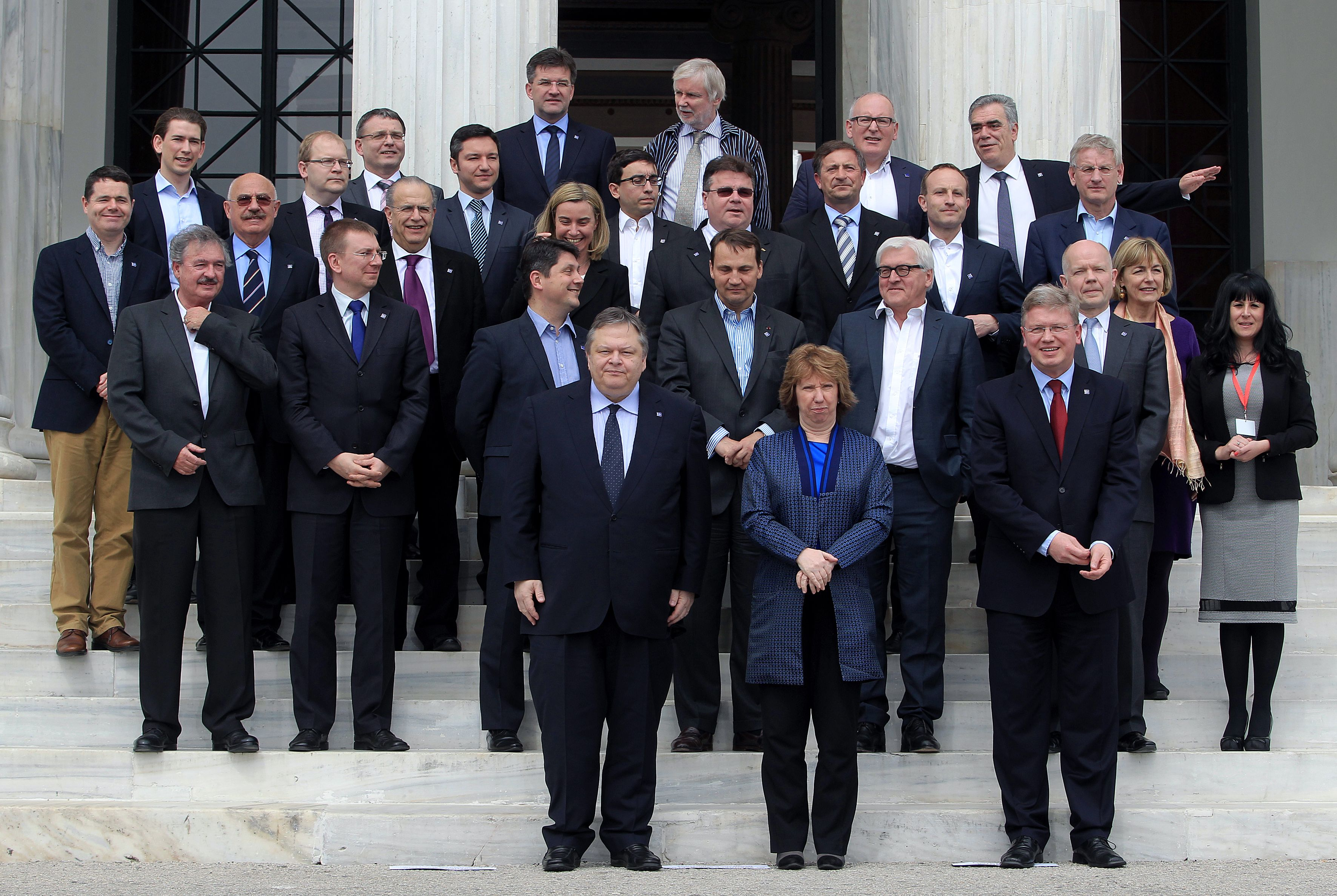 Την Παρασκευή 4 και το Σάββατο 5 Απριλίου, πραγματοποιήθηκε στην Αθήνα, στο πλαίσιο της Ελληνικής Προεδρίας του Συμβουλίου της Ε.Ε., άτυπη Συνάντηση των Υπουργών Εξωτερικών των κρατών – μελών της Ευρωπαϊκής Ένωσης «Gymnich», στο Ζάππειο Μέγαρο Πηγή: ΑΠΕ